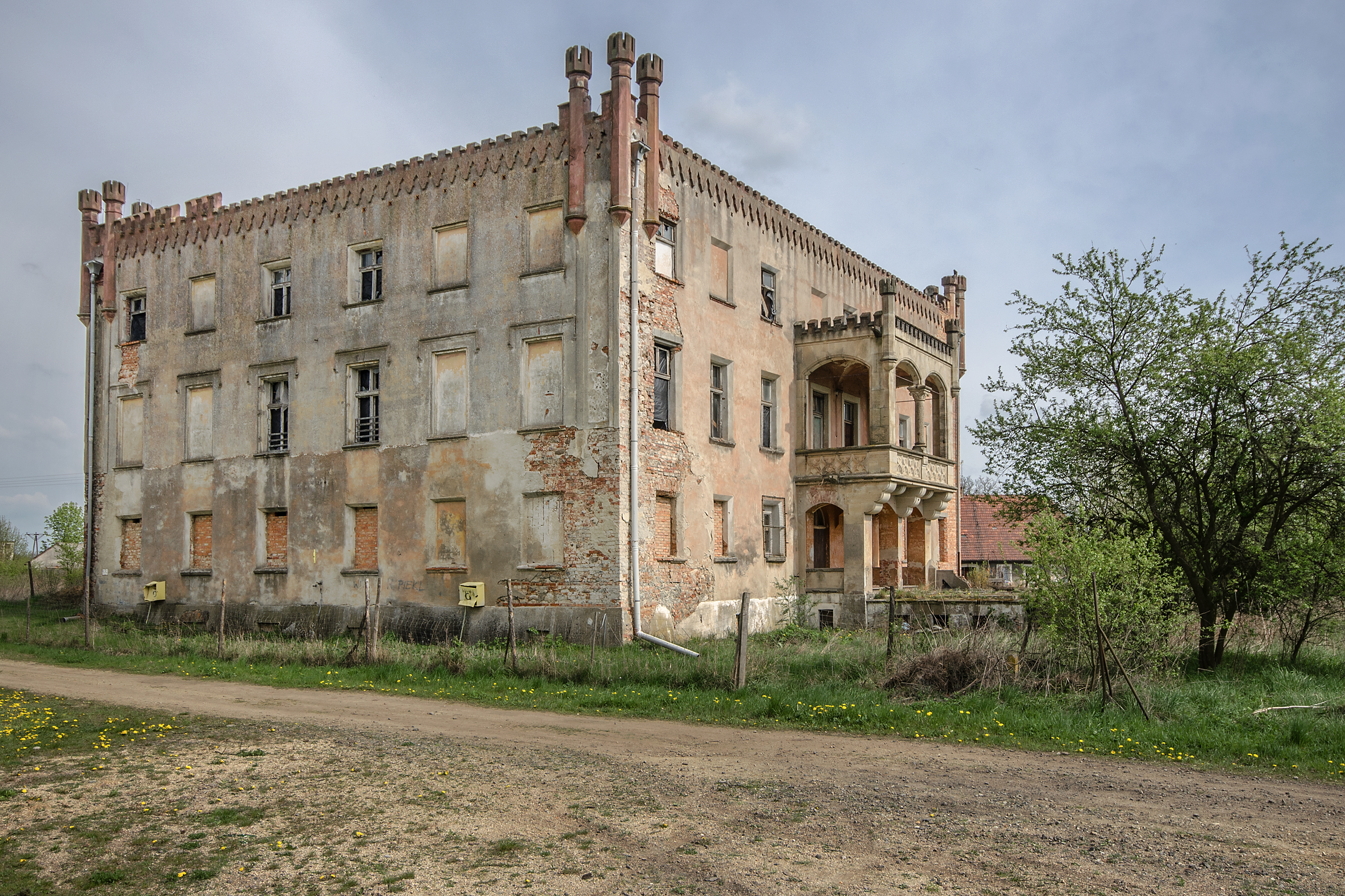 Górzyn, pałac, po 1880